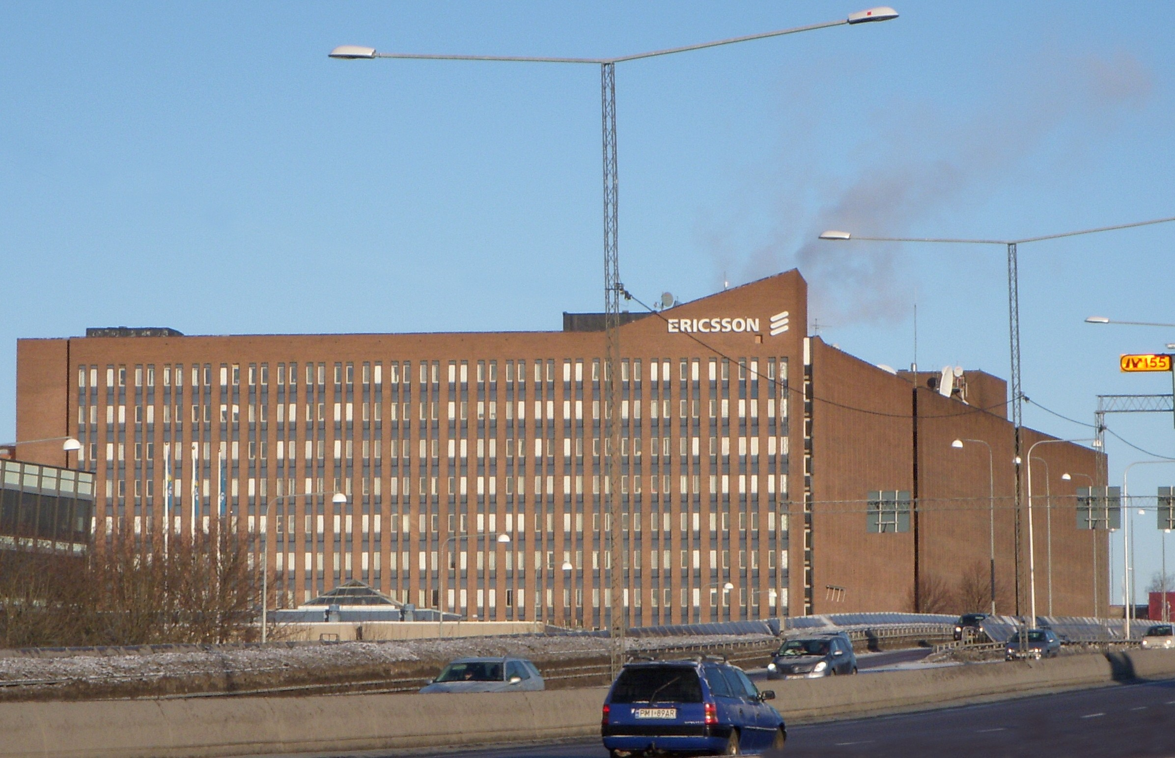 LM Ericssons kontorsbyggnad vid Södertäljevägen, Stockholm